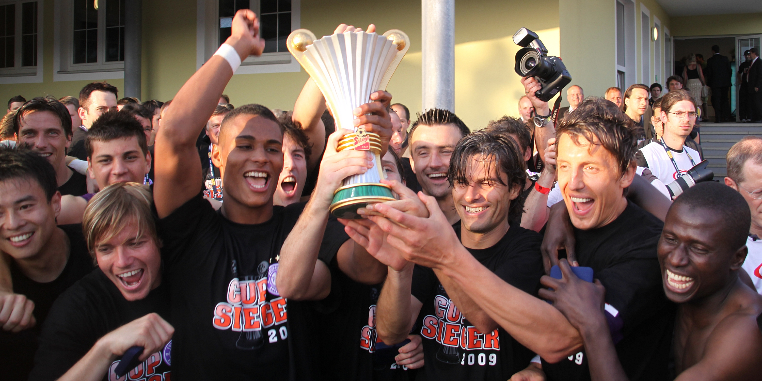 Finale im Österreichischer Fußball-Cup 2008/09 - FC Admira Wacker Mödling gegen FK Austria Wien: Pokaljubel (Bild 1)